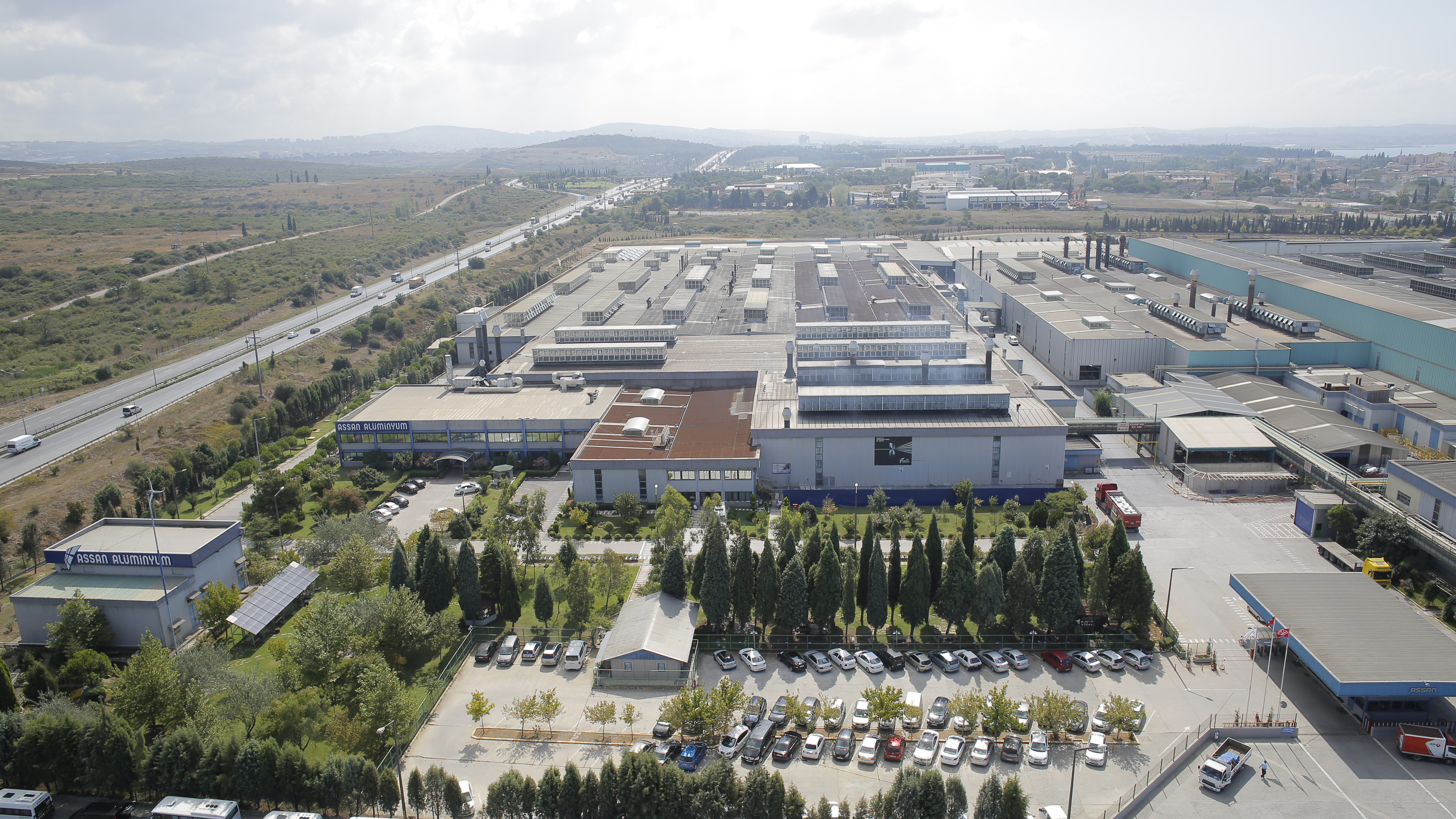 Assan Alüminyum - Tuzla